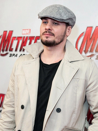 Андрей Батт на премьере фильма "Мстители: Эра Альтрона" в Москве.